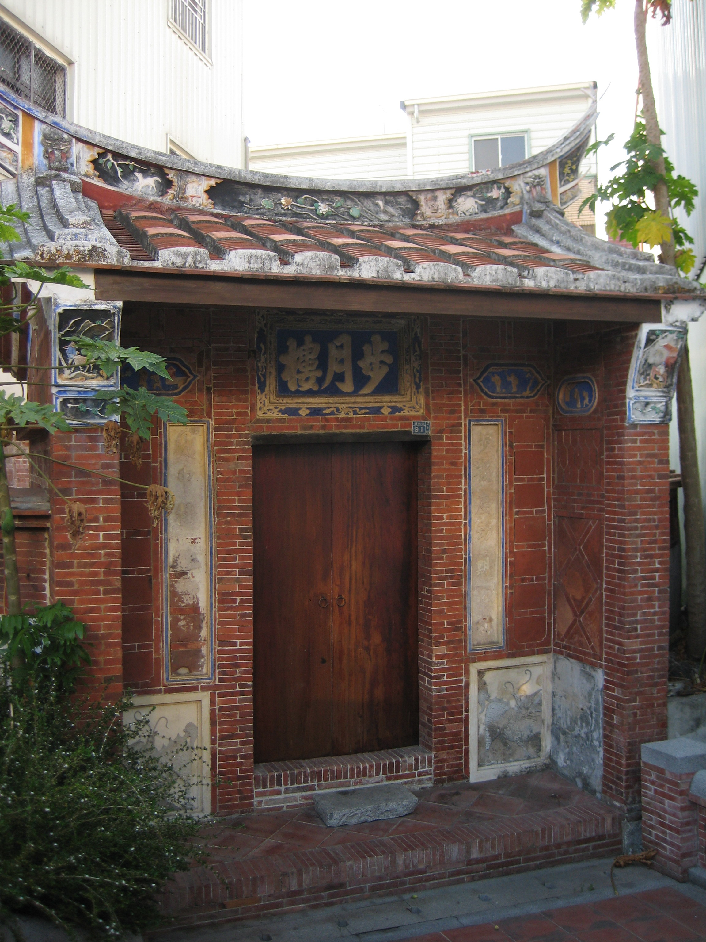 屏東縣佳冬鄉蕭家古厝的步月樓